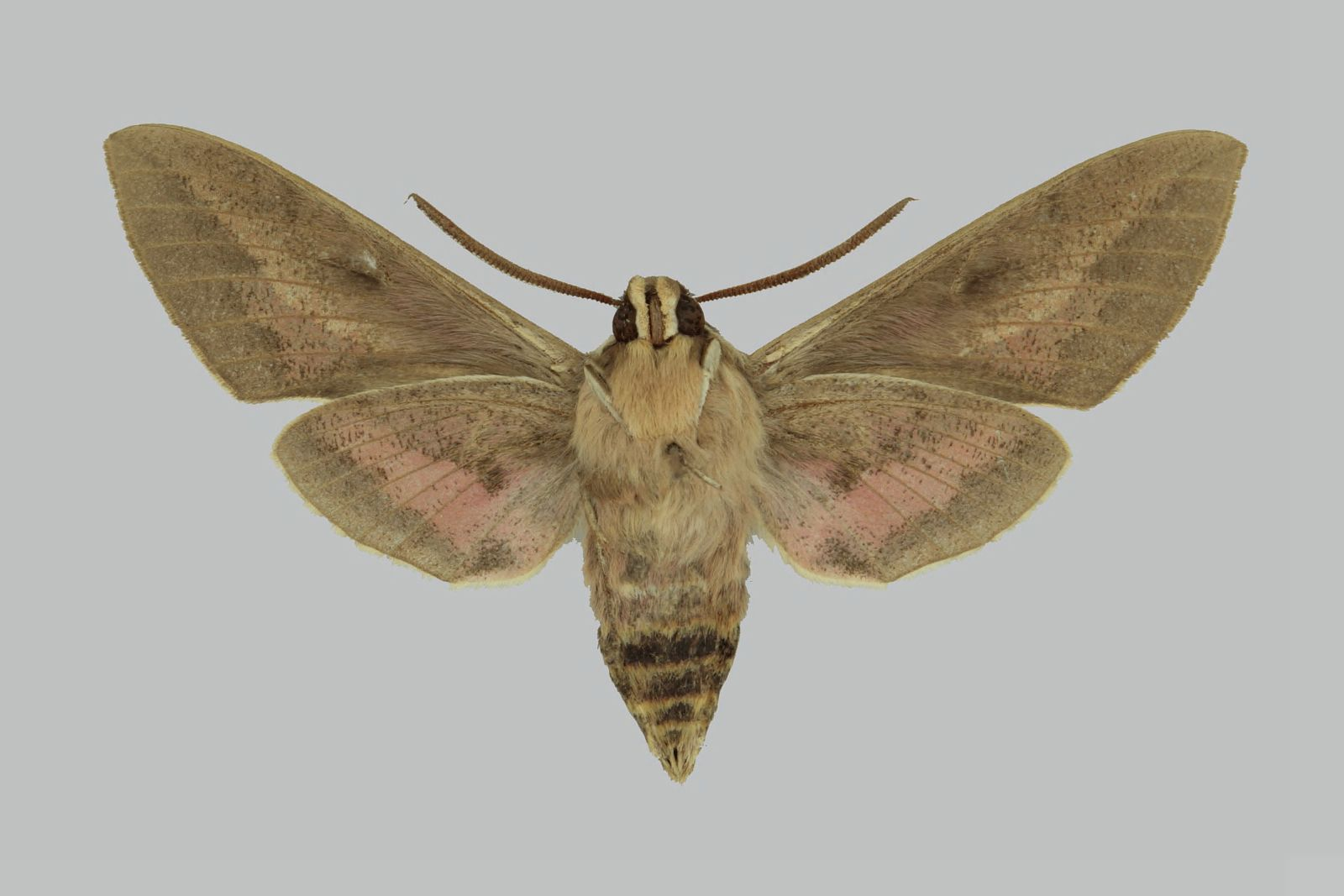 Hyles stroehlei, male, underside. Pakistan, Hindukush Mts., 5km E Shandur-pass